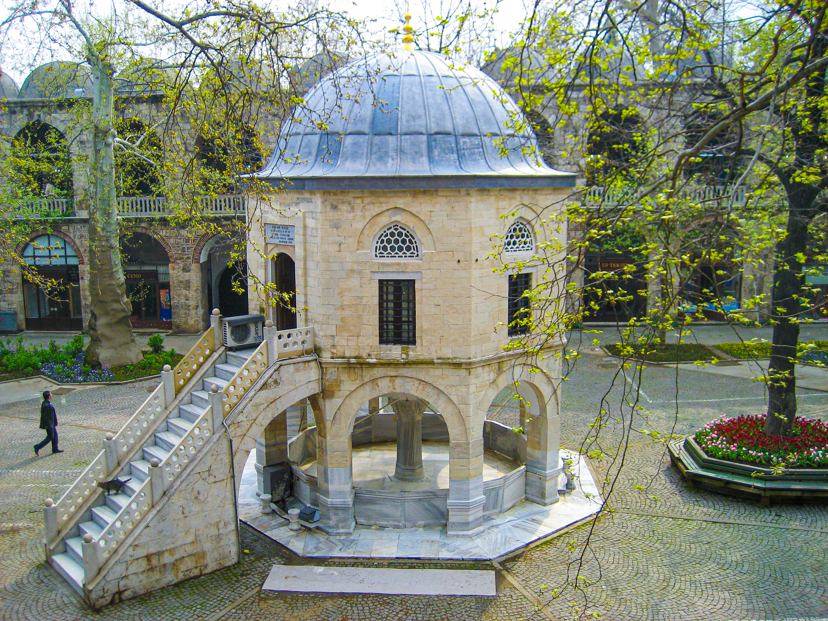 Koza Han